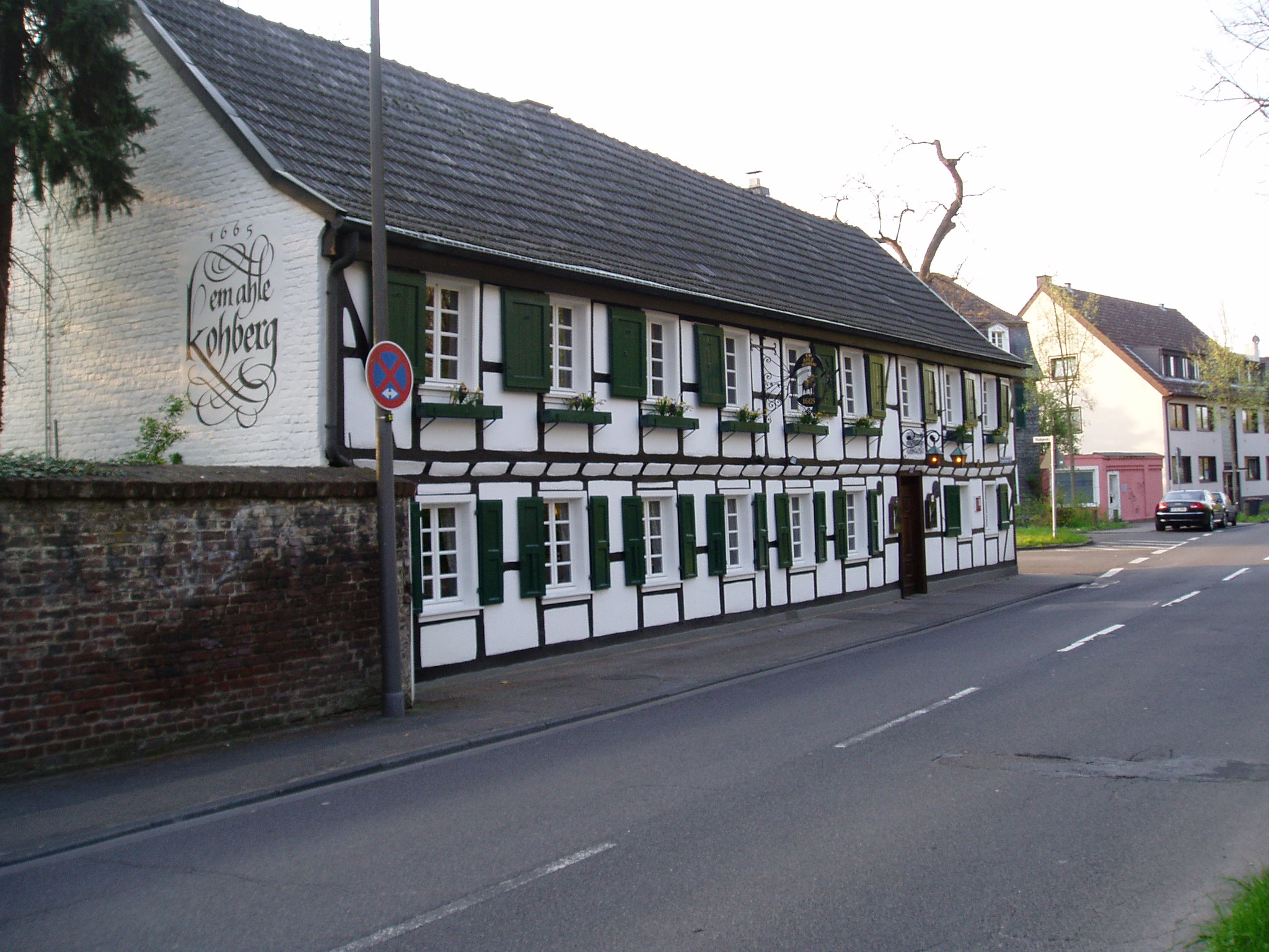 Köln-Merheim - Em ahle Kohberg - Ältestes Gasthaus Köln/rrh.